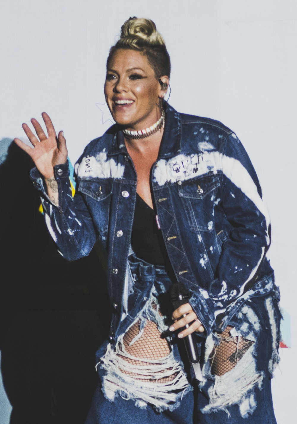 PinkVFest190817-33